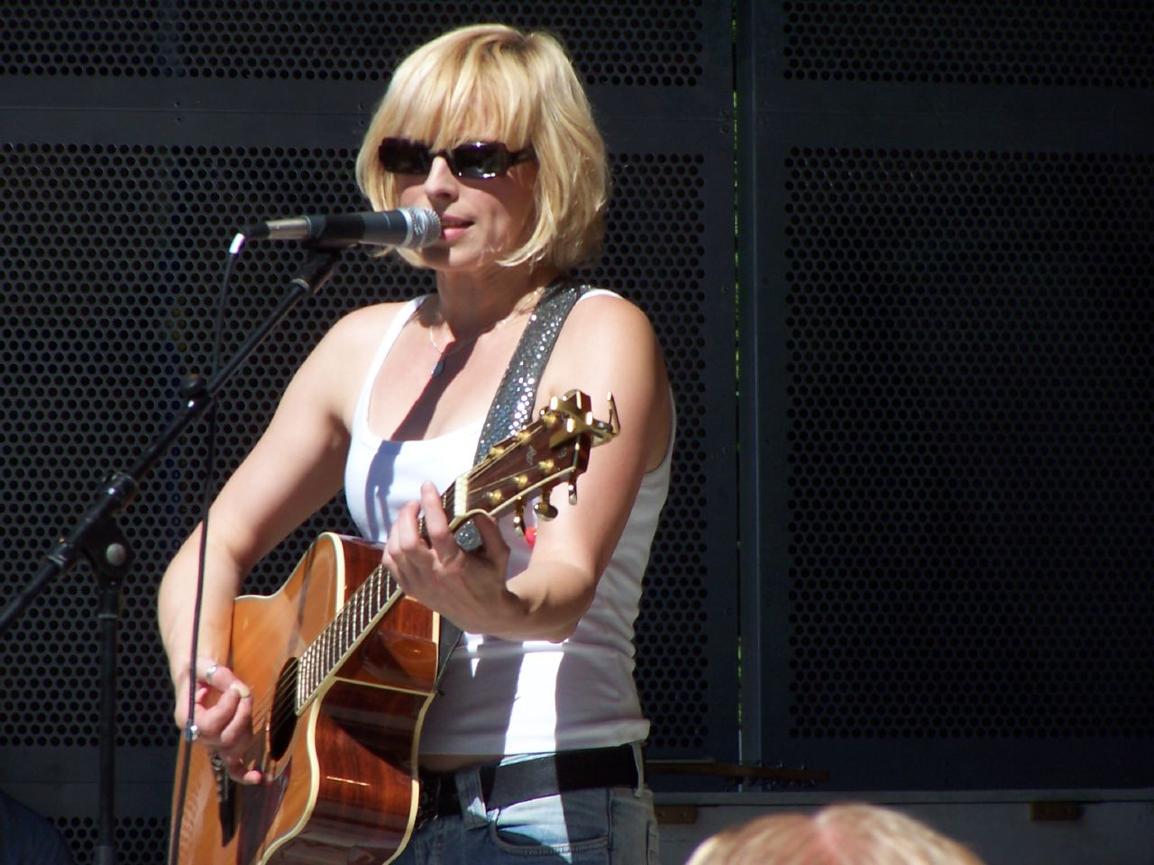 Carol van Dijk singing in the Vondelpark theatre.